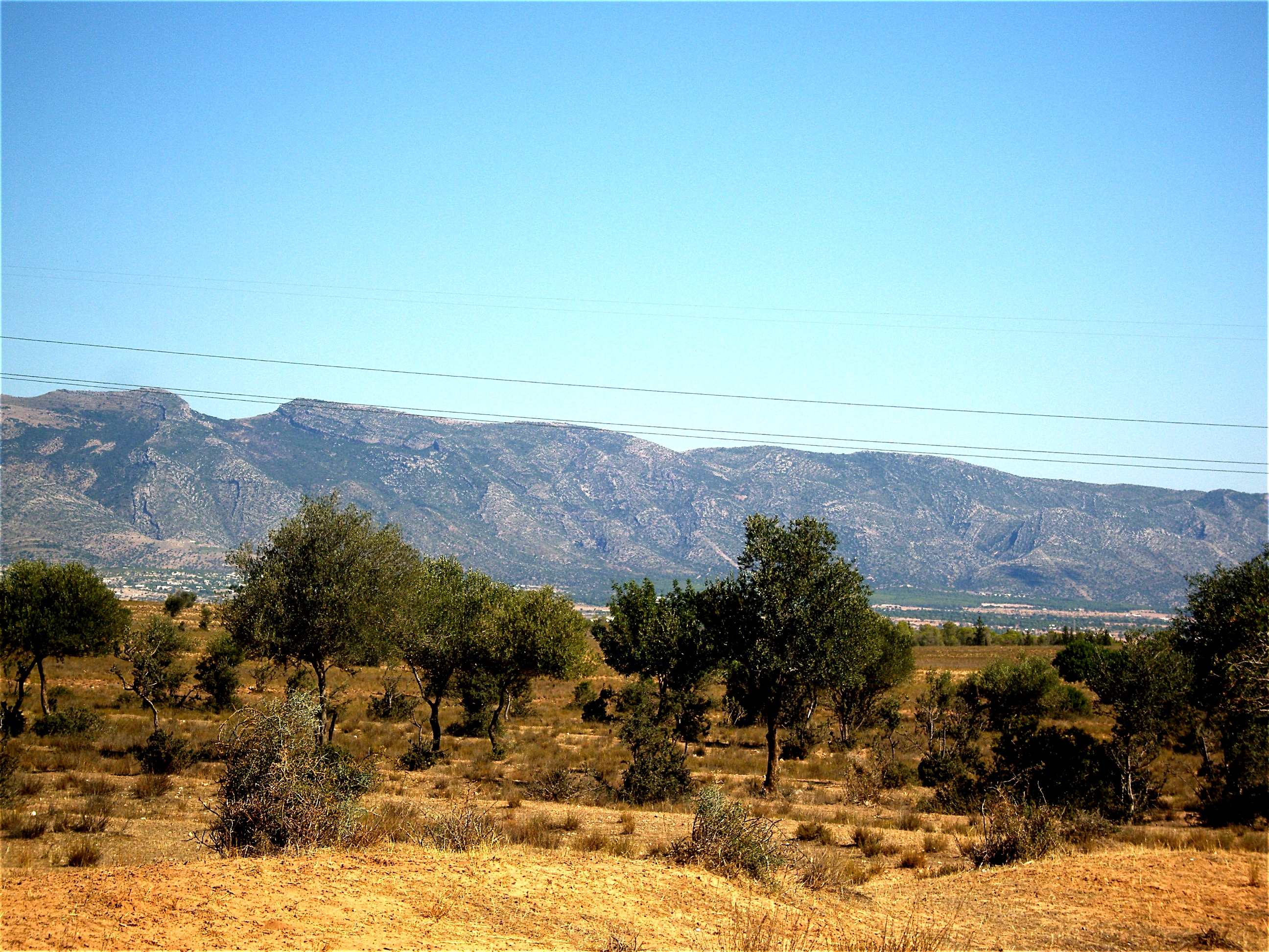 Vue du versant méridional du Djebel Serj (Siliana - Tunisie)